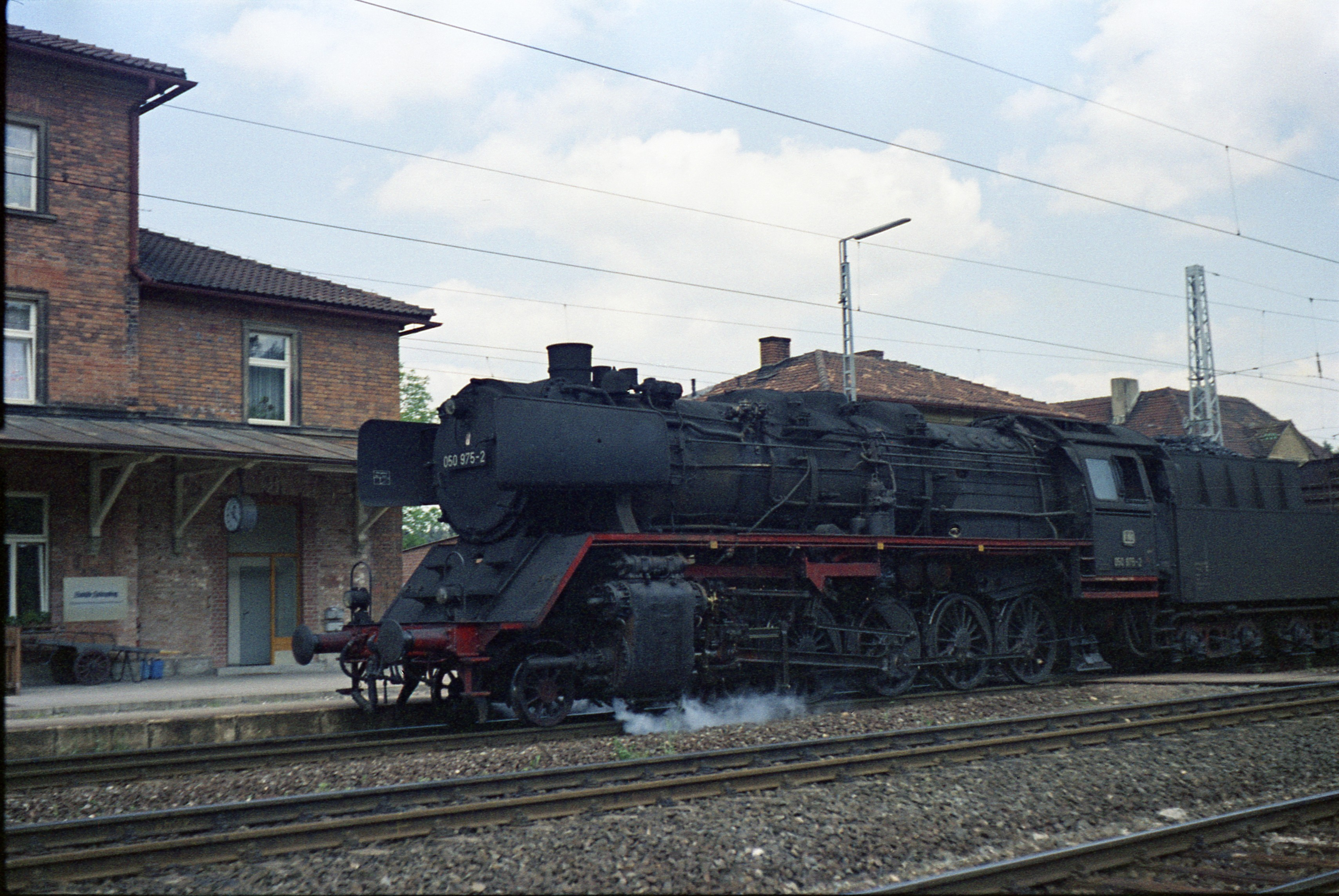 DB 050 975-2 im Bahnhof Wicklesgreuth